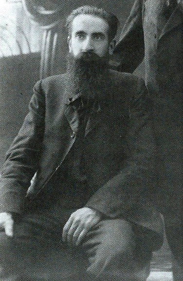 Portret van Lodewijk van Mierop (1870-1930)